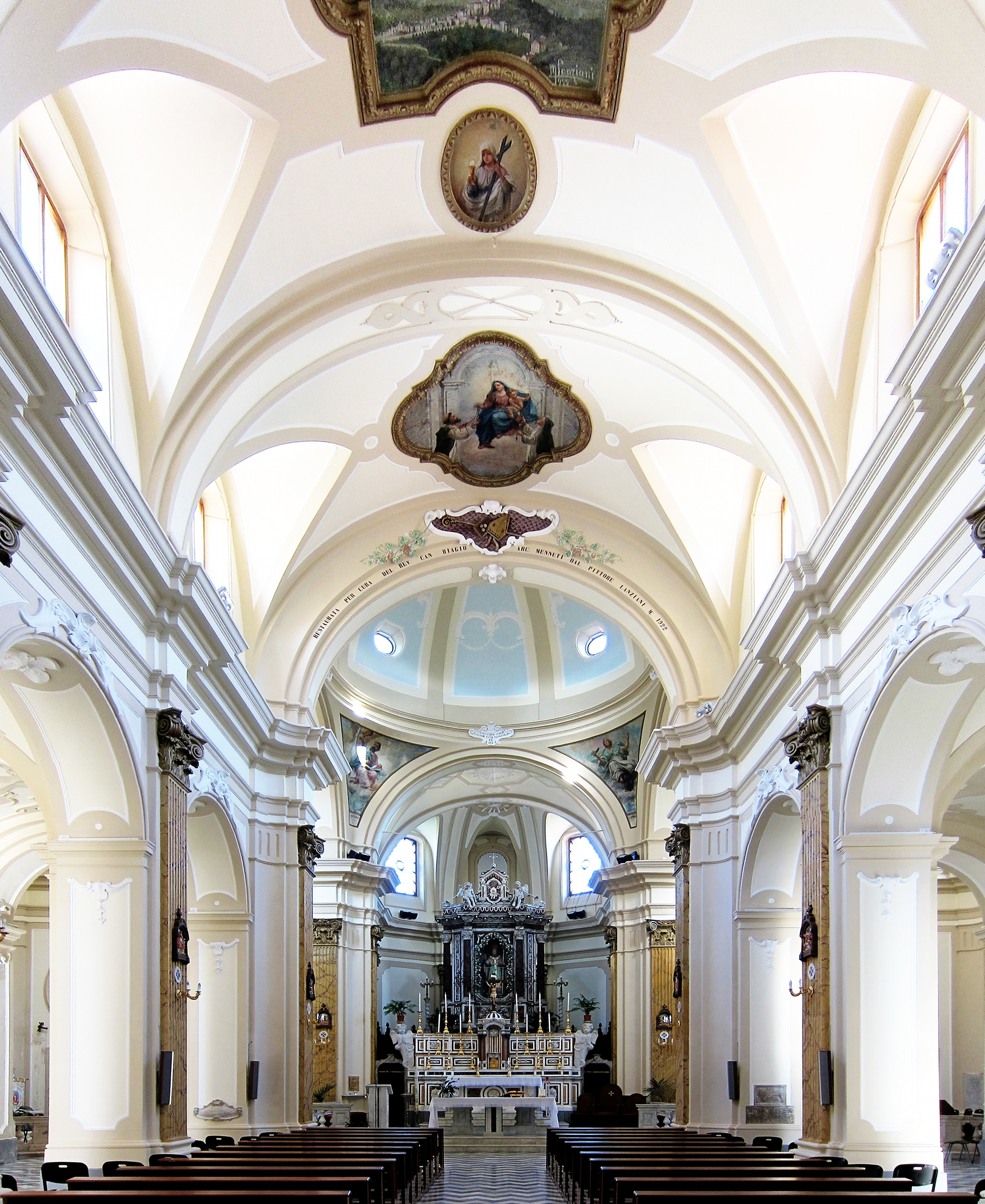 La navata della Chiesa di San Nicola a Rivello (Basilicata).